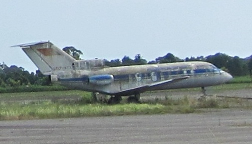 Як-40 борт CCCP-87335 (заводской - 9510838) в аэропорту Бабушара (Сухум) в 2014 году. Бывший личный борт Эдуарда Шеварнадзе. С 1993 года эксплуатировался в Абхазских авиалиниях. В 2003 году отставлен на хранение.